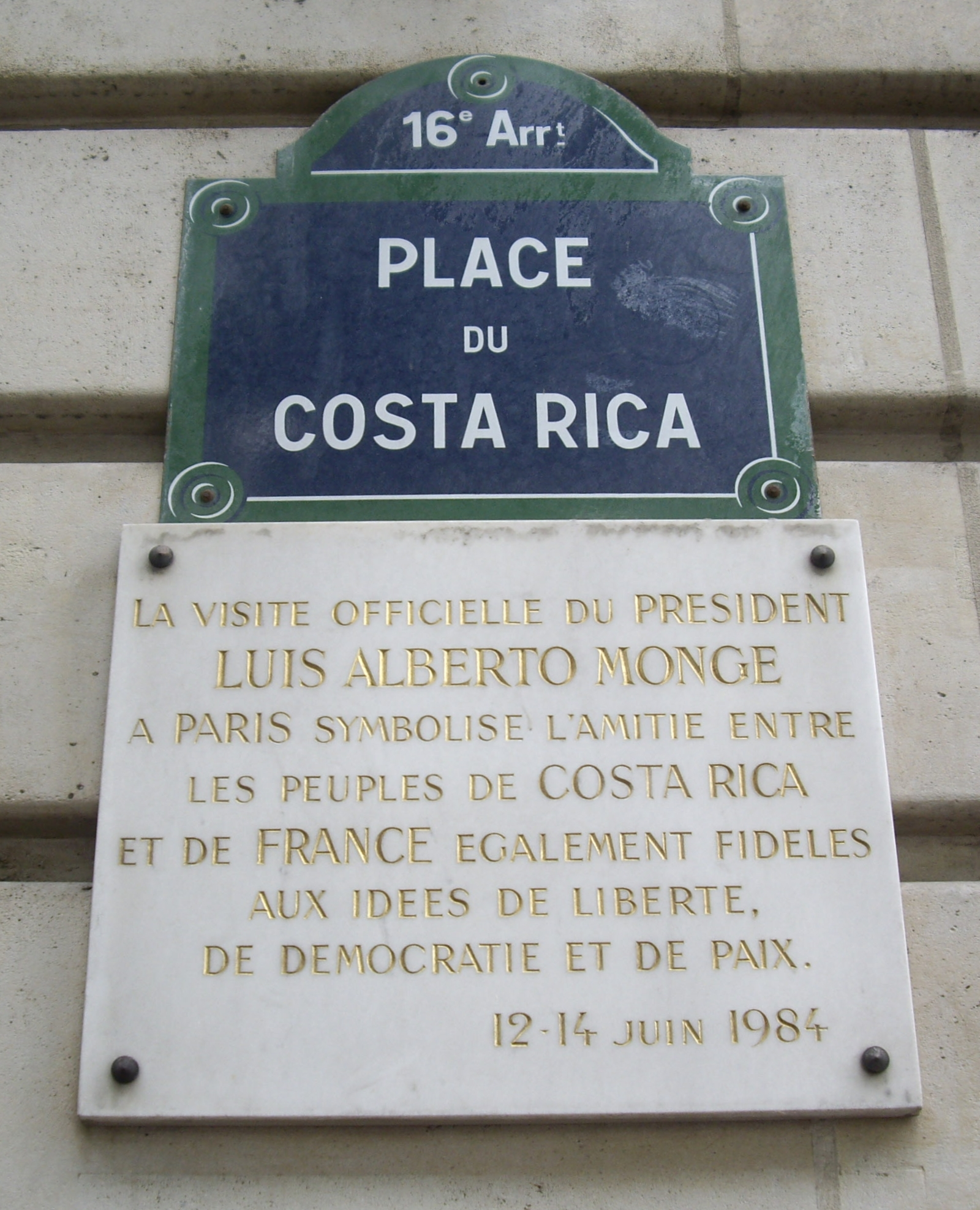 Plaque apposée place de Costa-Rica, à l'angle du boulevard Delessert et de la rue de l'Alboni, Paris 16e.« La visite officielle du président Luis Alberto Monge à Paris symbolise l'amitié entre les peuples de Costa Rica et de France, également fidèles aux idées de liberté, de démocratie et de paix. 12-14 juin 1984. »Note : La plaque de la place porte le nom « Place du Costa Rica » au lieu de « Place de Costa Rica ».